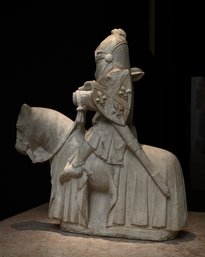 Mestre Pero, Cavaleiro medieval, pedra, Museu Nacional de Machado de Castro